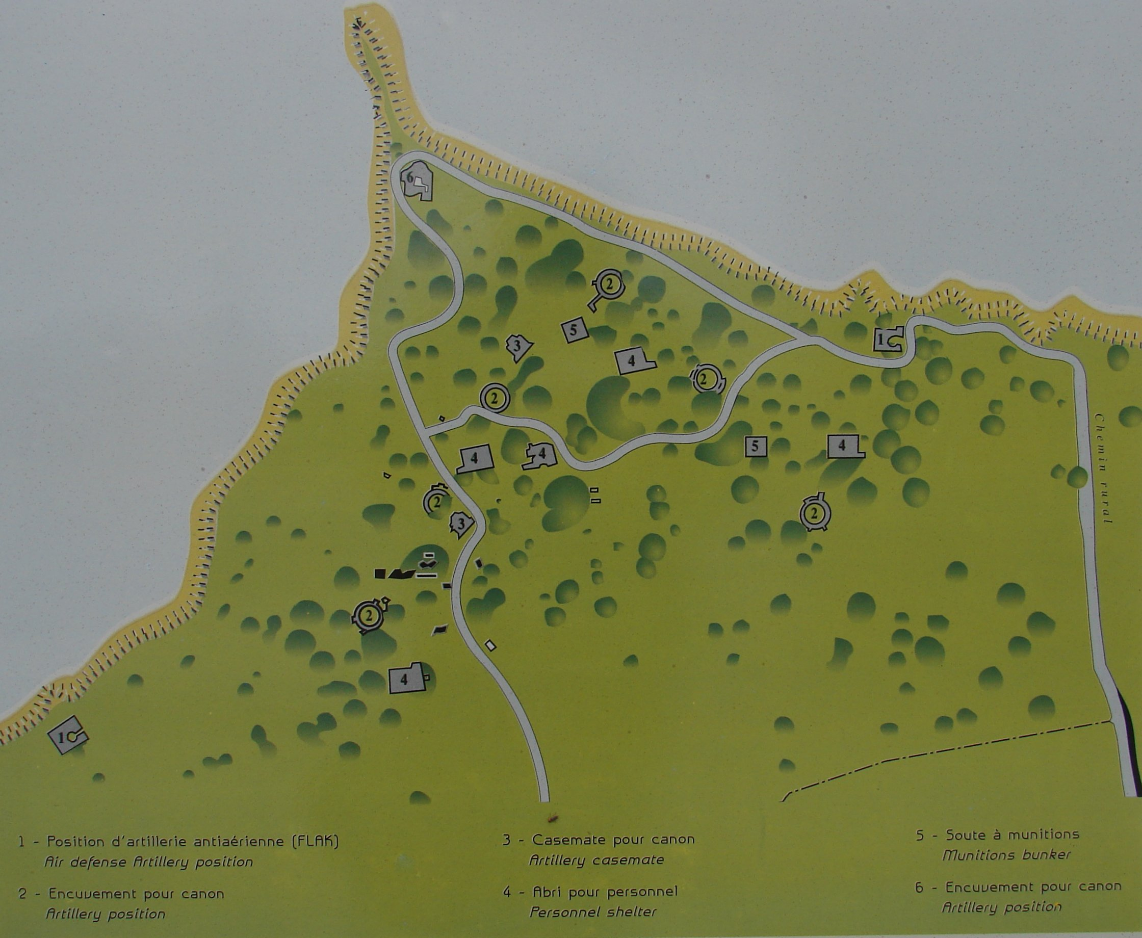 Mapa da posição e domonumento de Pointe du Hoc. Map of Pointe du Hoc